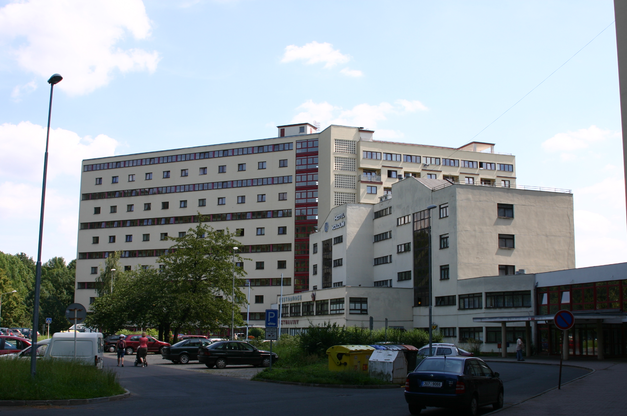 Litvínov - Koldům